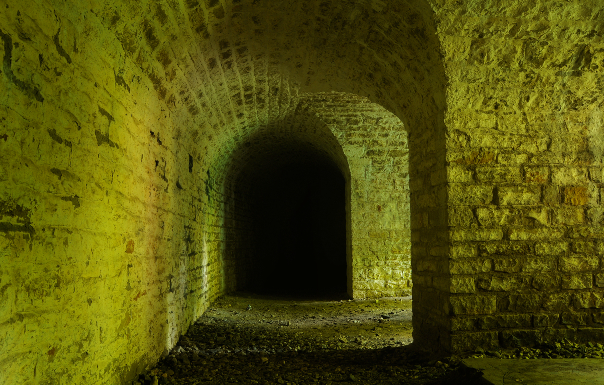 Coffre de contrescarpe Sud-Ouest. Basses perches fortifications.